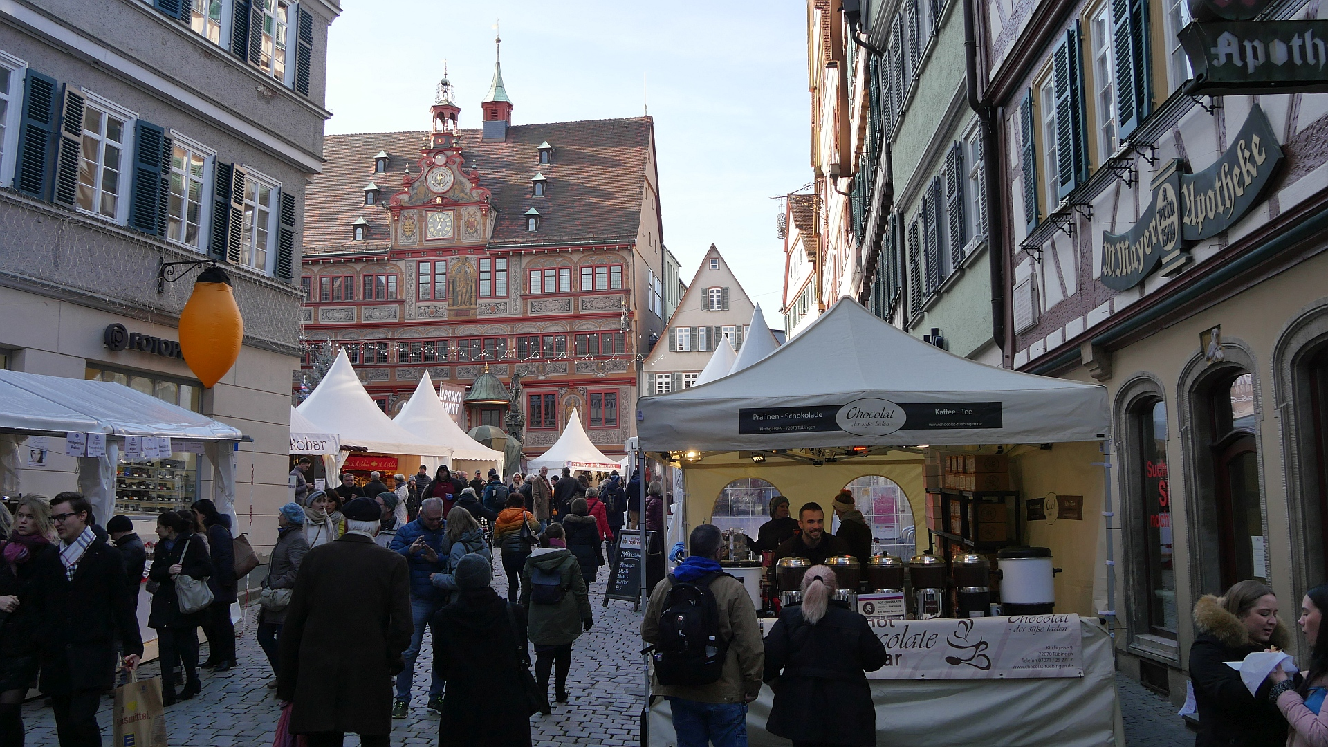 chokolART Tübingen 2019